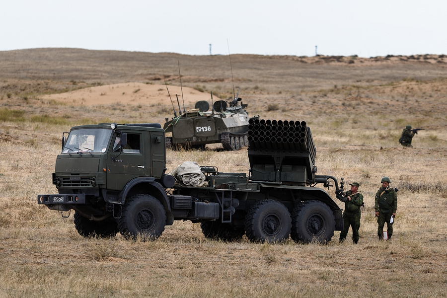 122-мм РСЗО 2Б26 17-й отдельной гвардейской мотострелковой бригады на полигоне Ашулук в 2015 году в ходе СКШУ «Центр-2015».